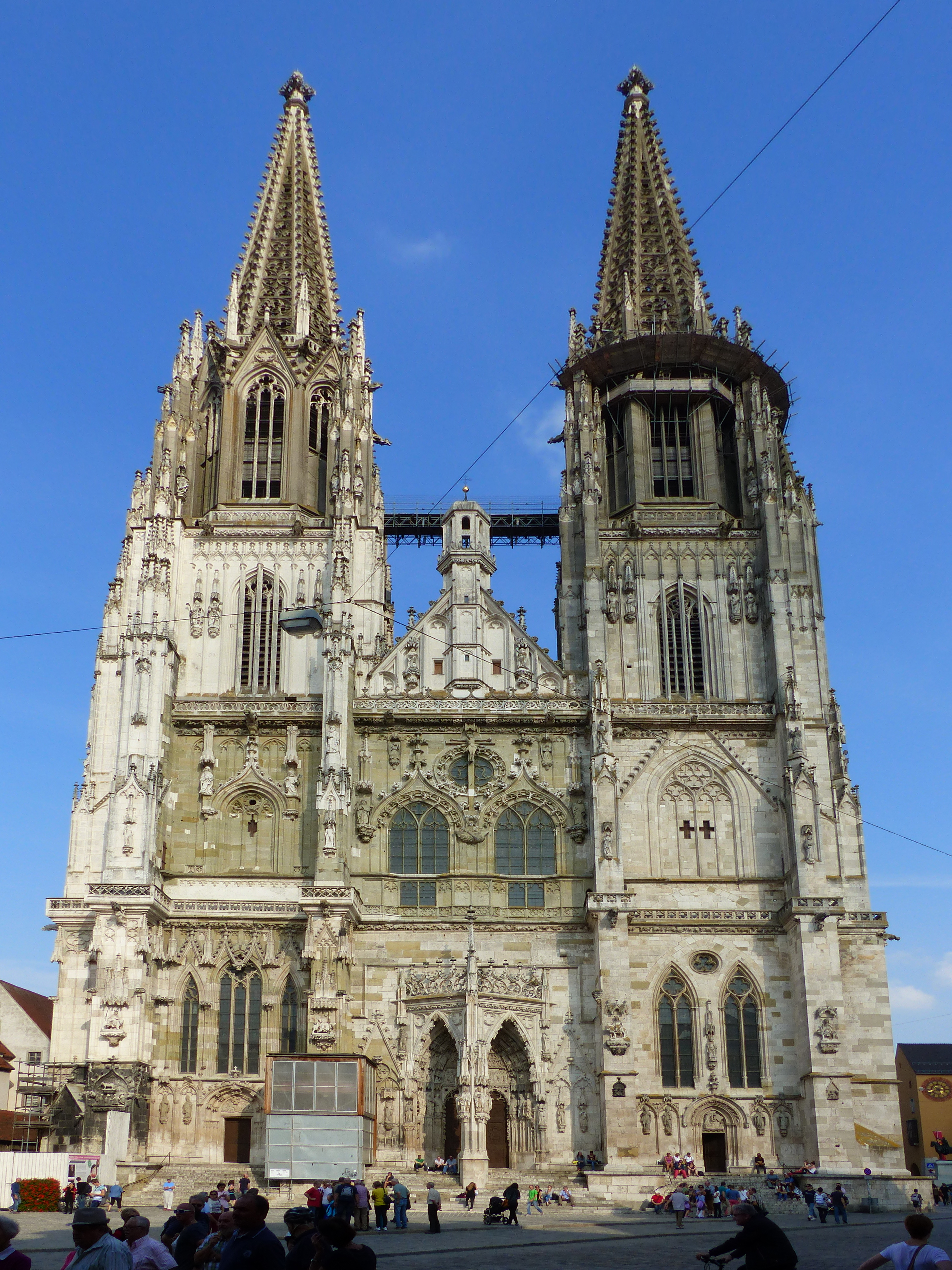 Regensburger DomThis is a photograph of an architectural monument.